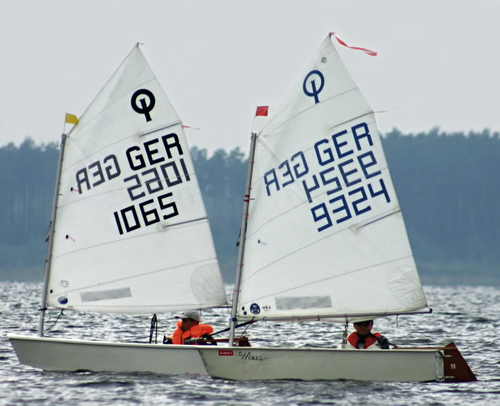 Optimistenjollen auf dem Großen Brombachsee